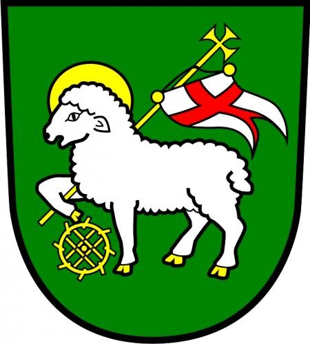 Kadov (okres Žďár nad Sázavou), znak obce